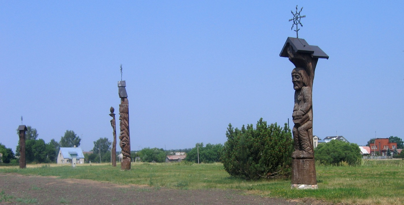 Autoriaus nuotrauka. 2006.07.11. Senoji Varėna: medžio skulptūrų parkelis